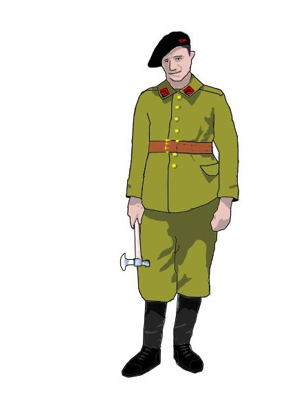 Planche réalisée à partir de la photographie du sapeur-forestier de 1ère classe MERCIER et sa famille en uniforme du Génie, 1939.